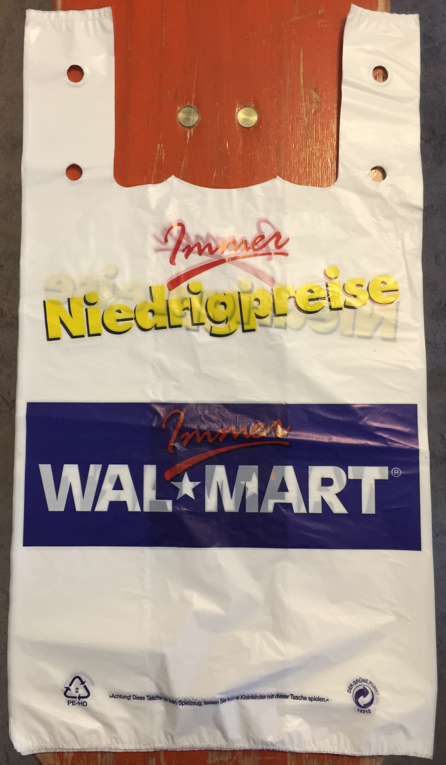 Plastiktüten von Walmart Deutschland, wie sie an der Kasse zu bekommen waren.